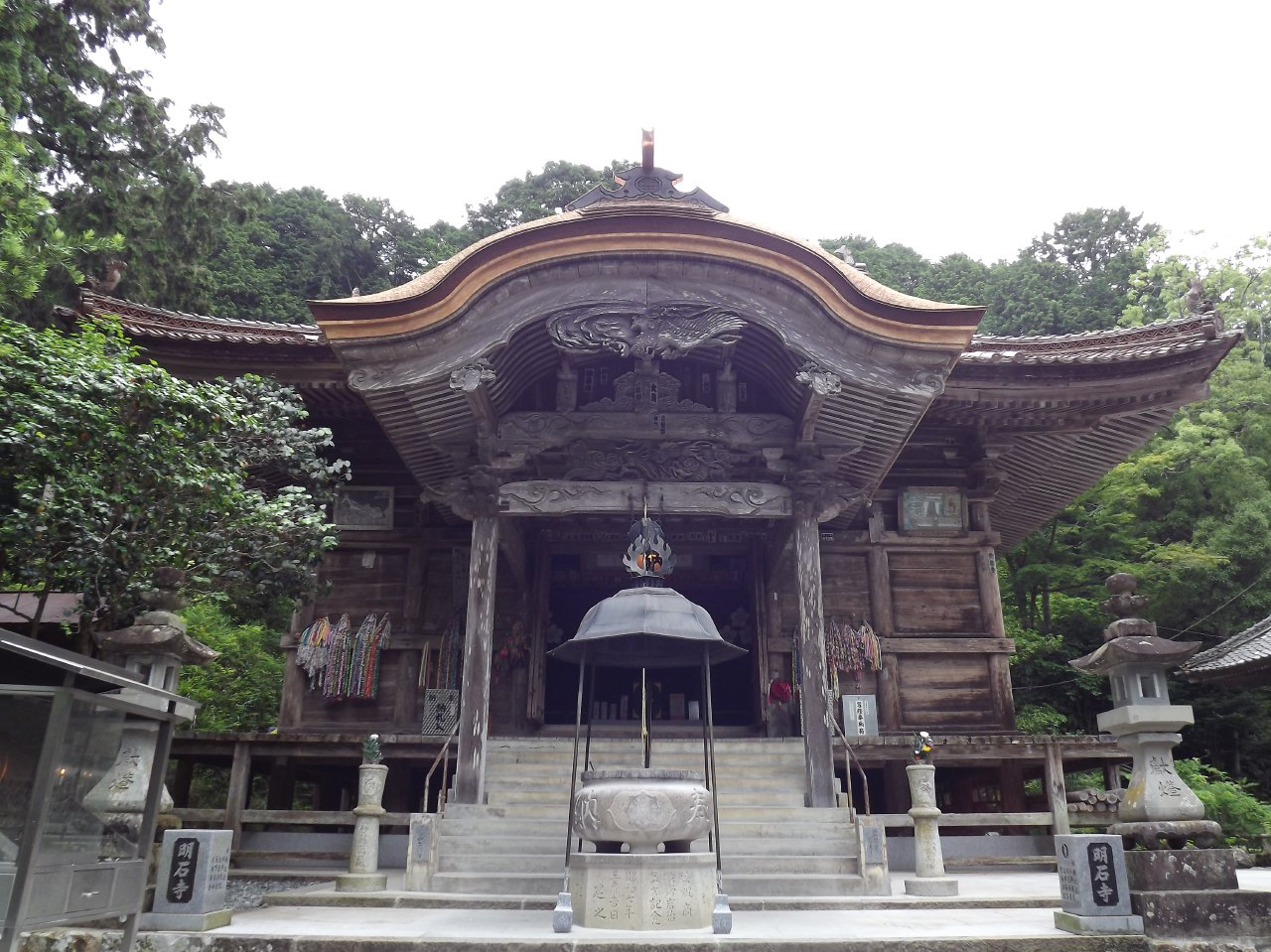 本堂屋根の中央前面が修繕された